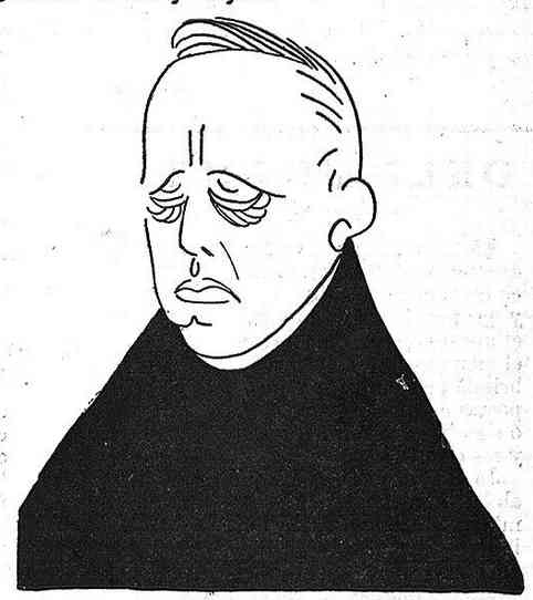 El Gay Saber. Galería cómica dels Mestres vius.